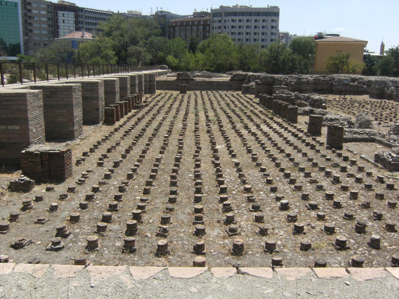 Ankara Roma Hamamı, soyunma odaları